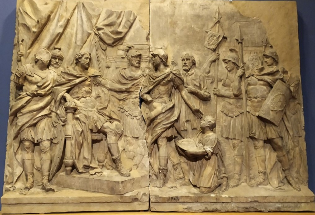 Omaggio di Umberto Biancamano all'imperatore Corrado, 149 x 197 cm., Accademia Albertina, Torino